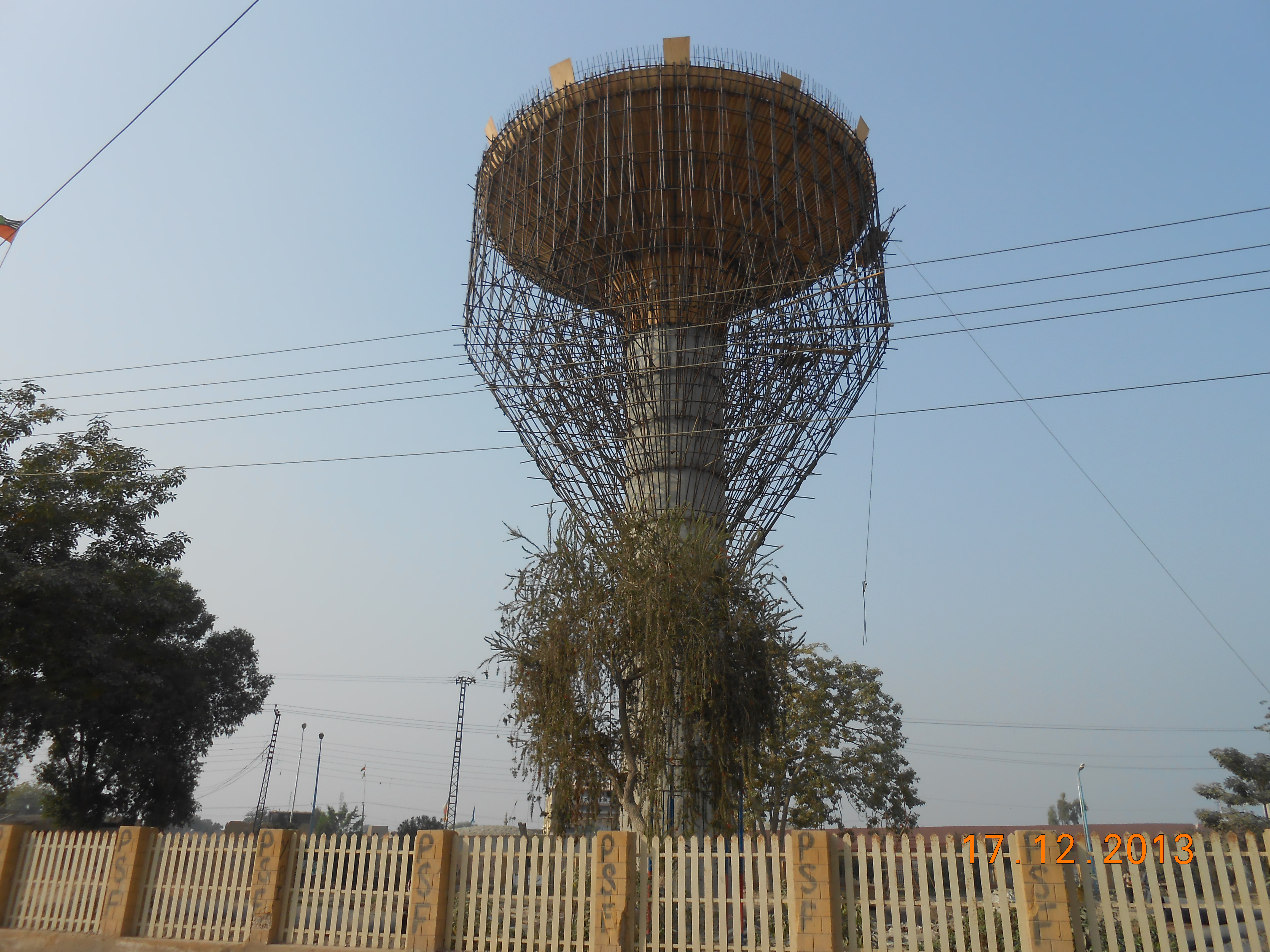 Khairpur, Pakistan